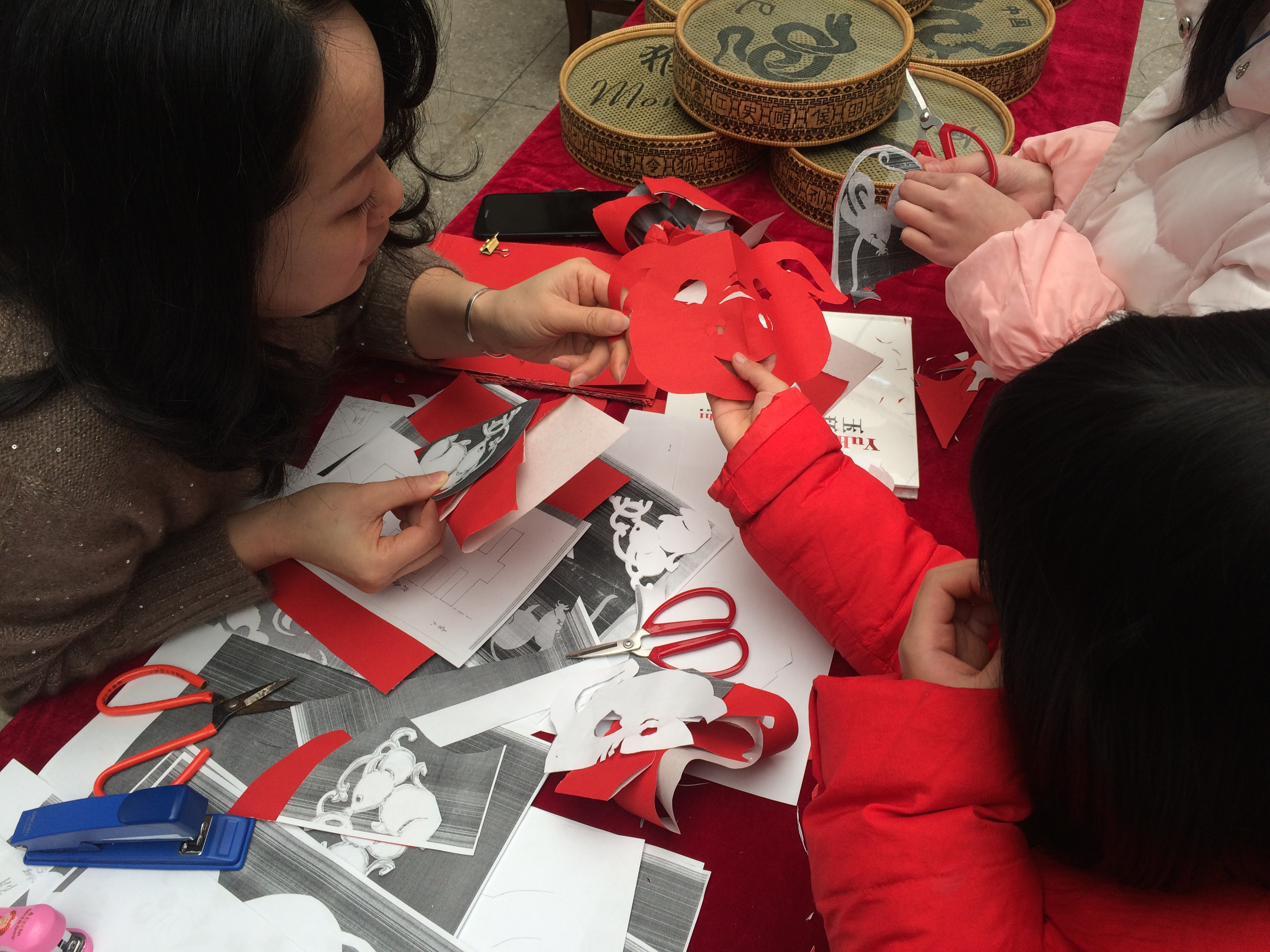 中文（中国大陆）: 玉环剪纸。